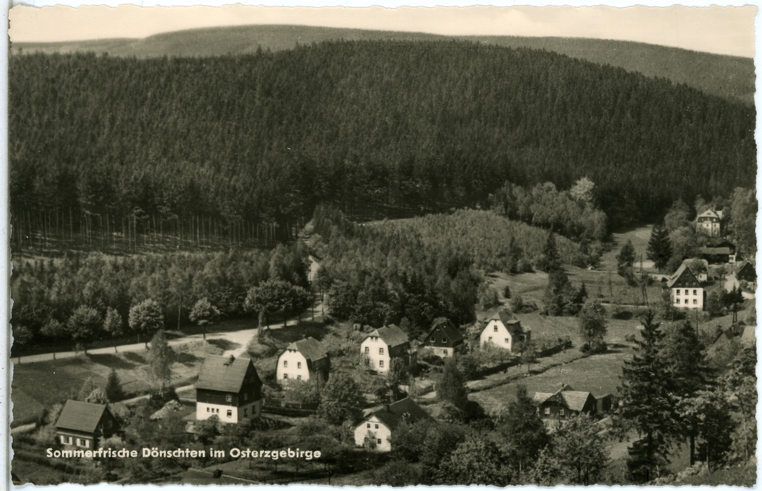 Dönschten; Blick auf Dönschten This postcard is from publisher Brück & Sohn in Meißen ( postcard has a unique number 29788 and is available in a higher resolution at the publisher. This images was uploaded in a cooperation project between Wikipedians and the publisher.